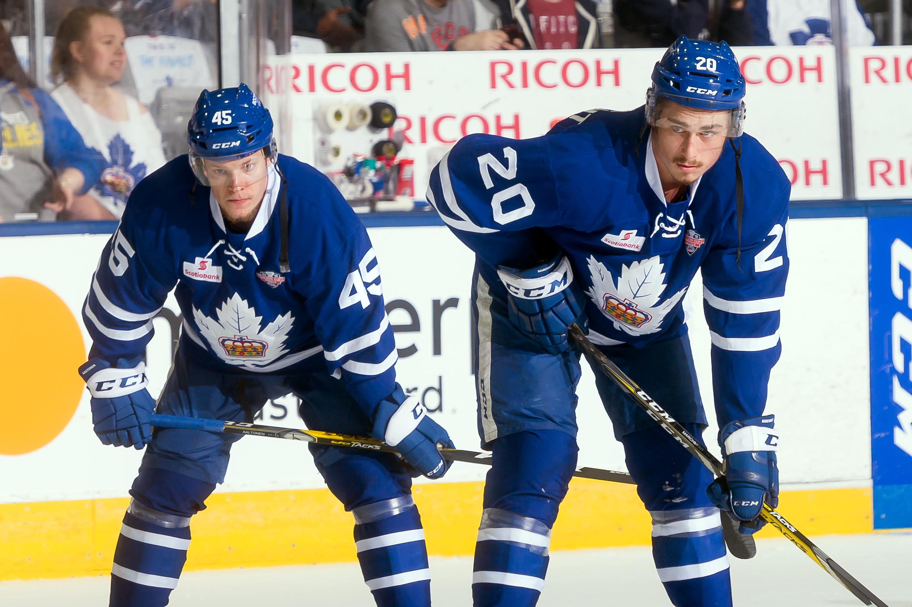 #20 Mason Marchment, #45 Miro Aaltonen